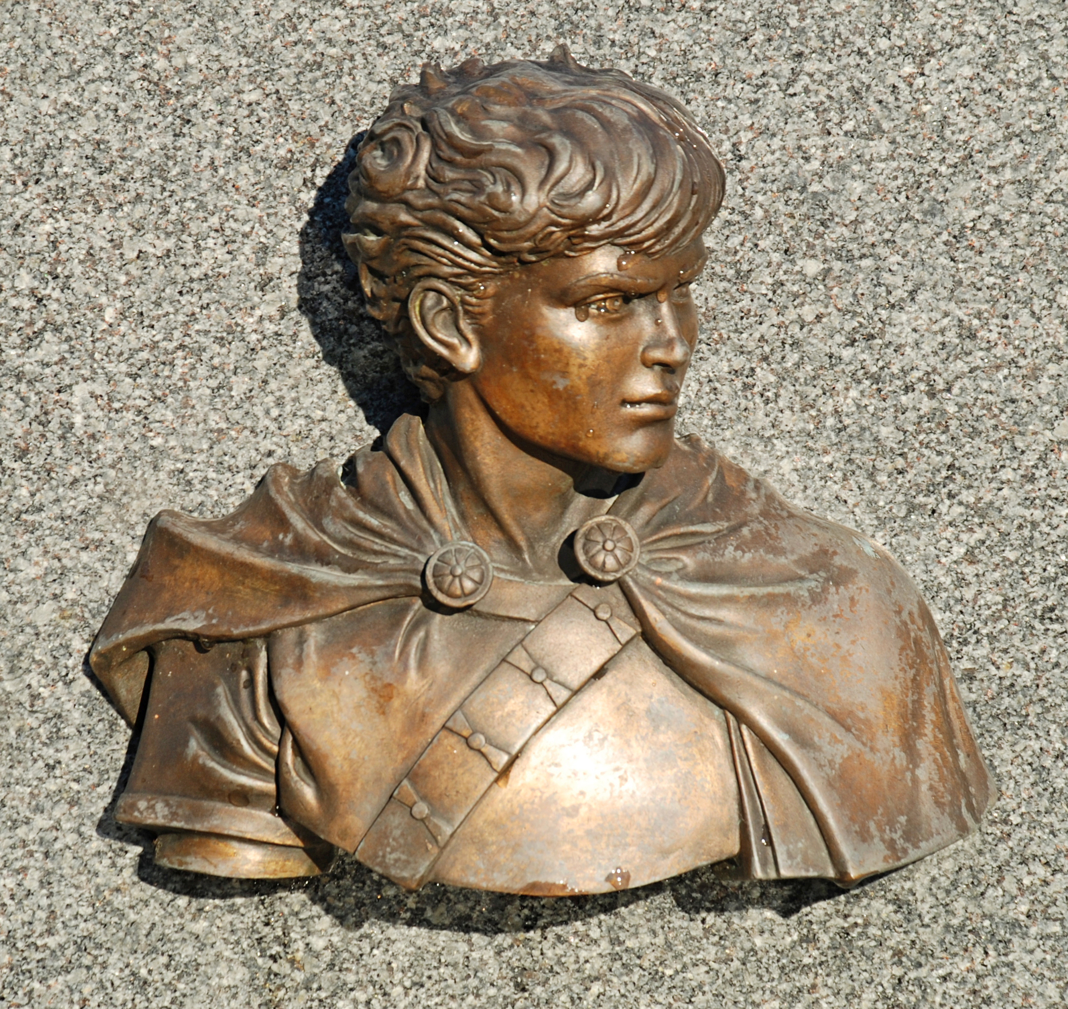 Belgique - Brabant wallon - Ottignies-Louvain-la-Neuve - Céroux - église Notre-Dame de Bon Secours - Cimetière - tombe de Jacques Martin - buste d'Alix